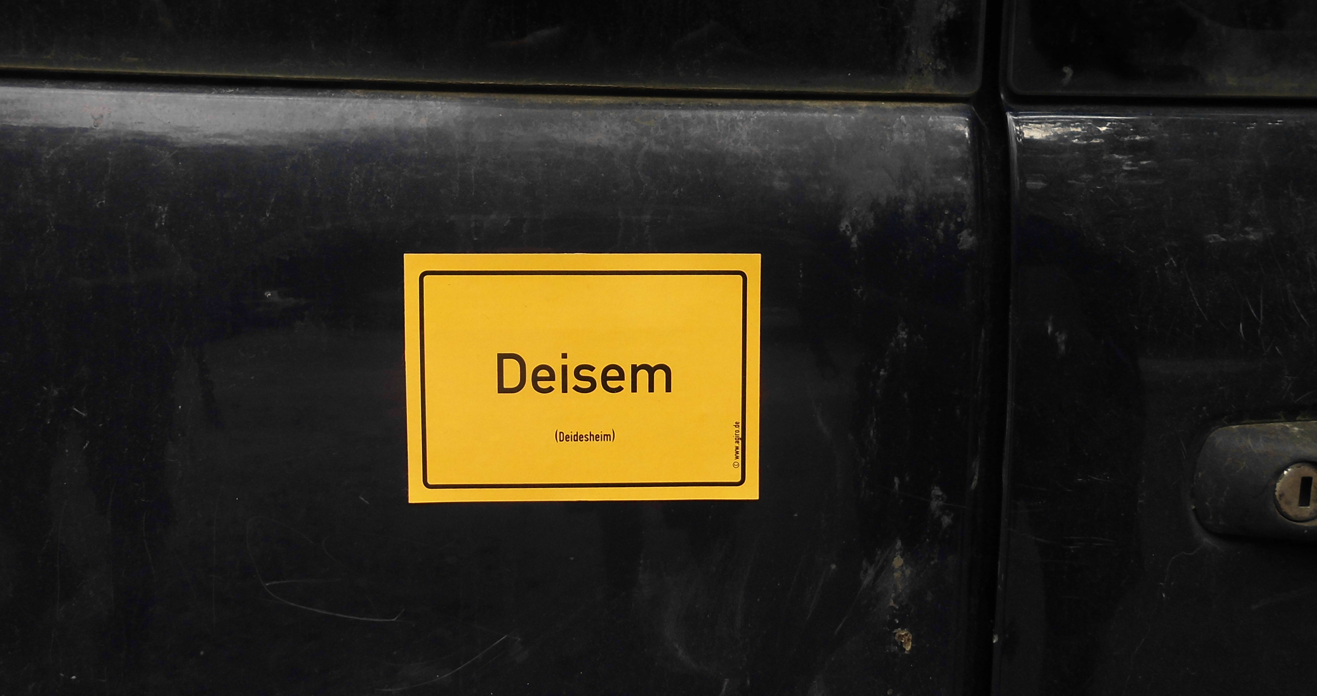 Ein einem Ortsschild nachempfundener Aufkleber auf einem Auto. Deisem ist die pfälzische Version von Deidesheim